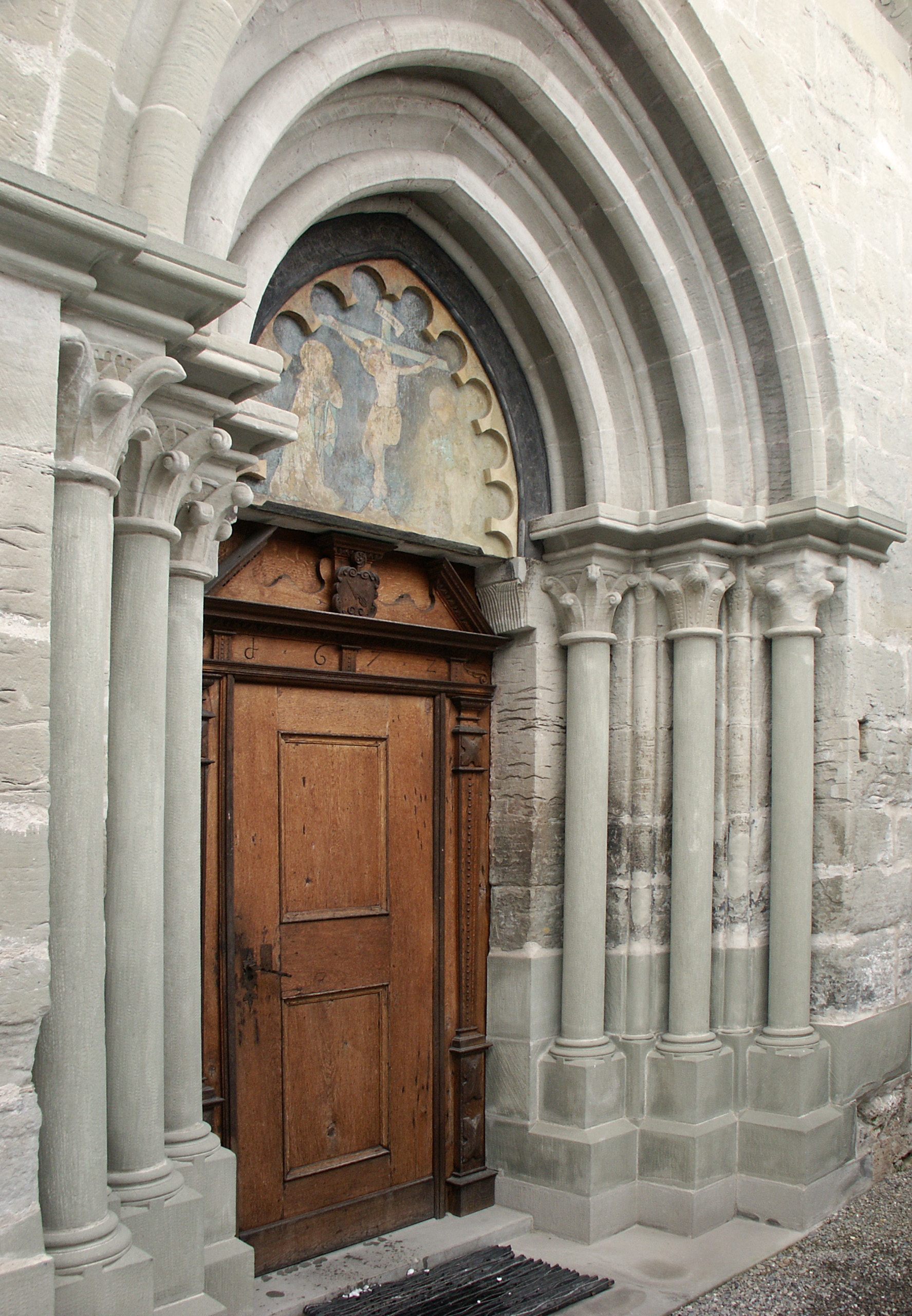 Author: Fanny Schertzer